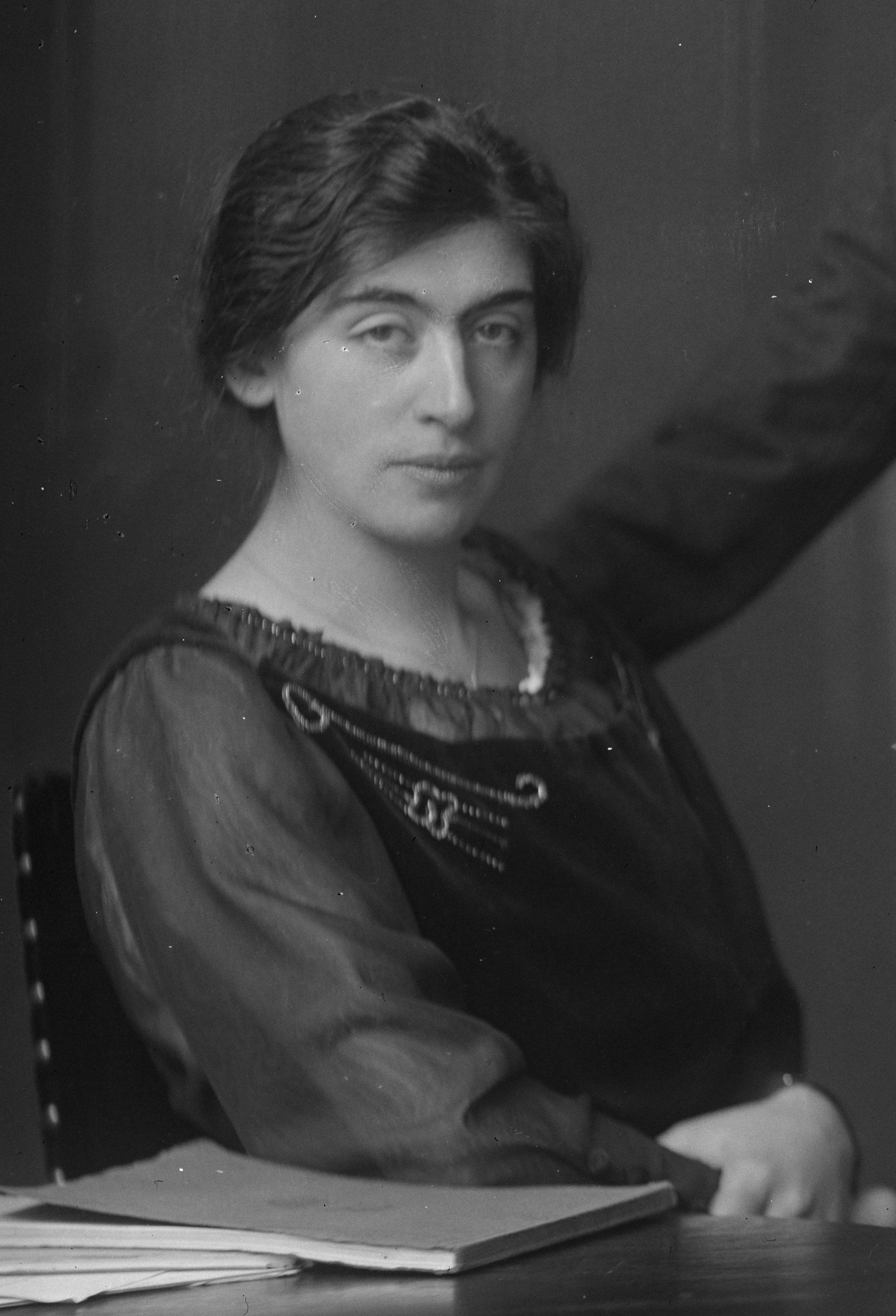 Administratie Merkelbach: Polak Op deze foto: Gesine van Gelder, Hannah (Hans) Polak, Henriëtte Antoinetta Schwarz, Leonard (Leo) Polak, Wilhelm (Willy) Polak Jaartal(len): 1917 Bestandsnaam: 010164018975 Instelling: Stadsarchief Amsterdam